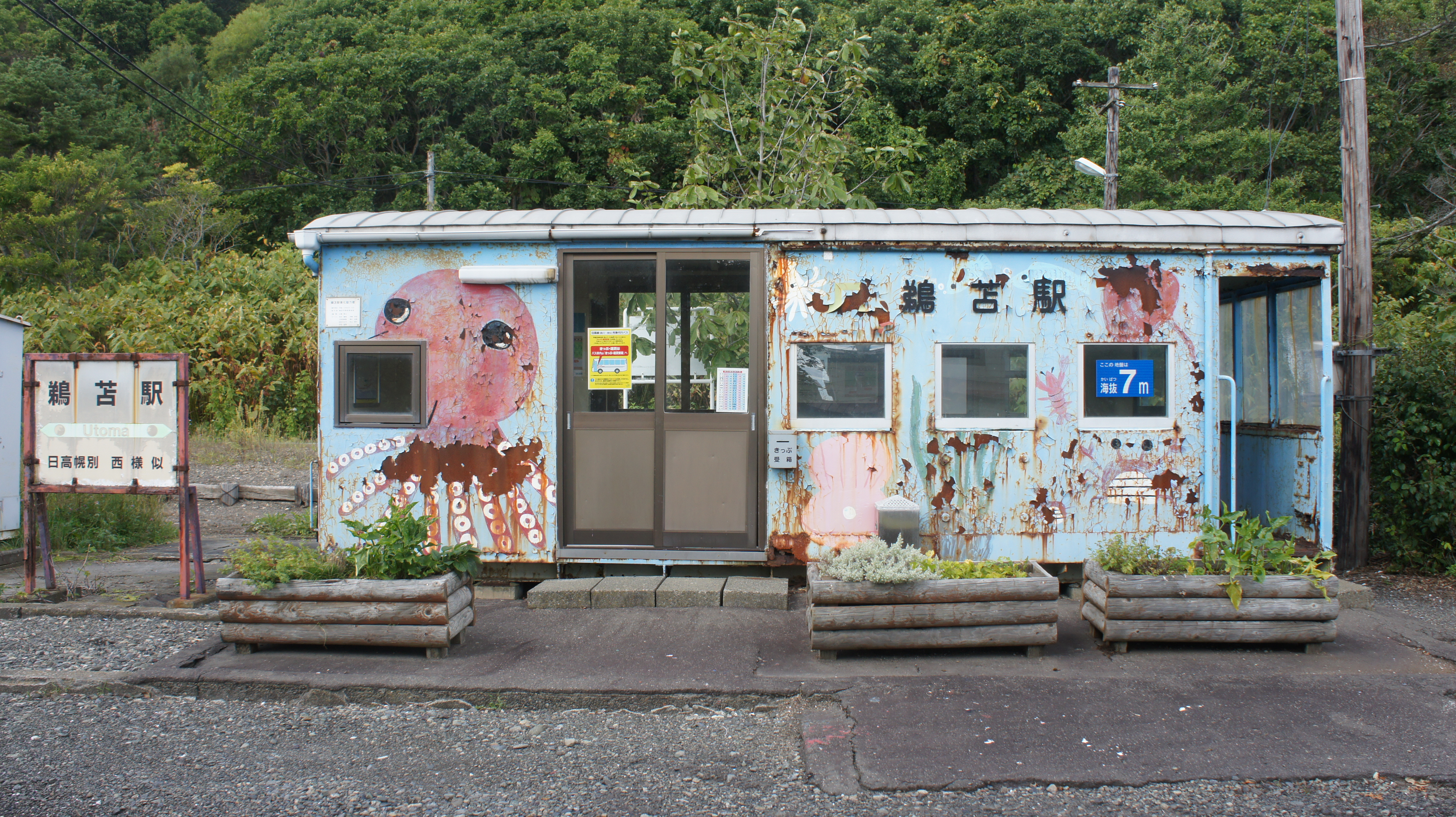 JR日高本線・鵜苫駅の駅舎